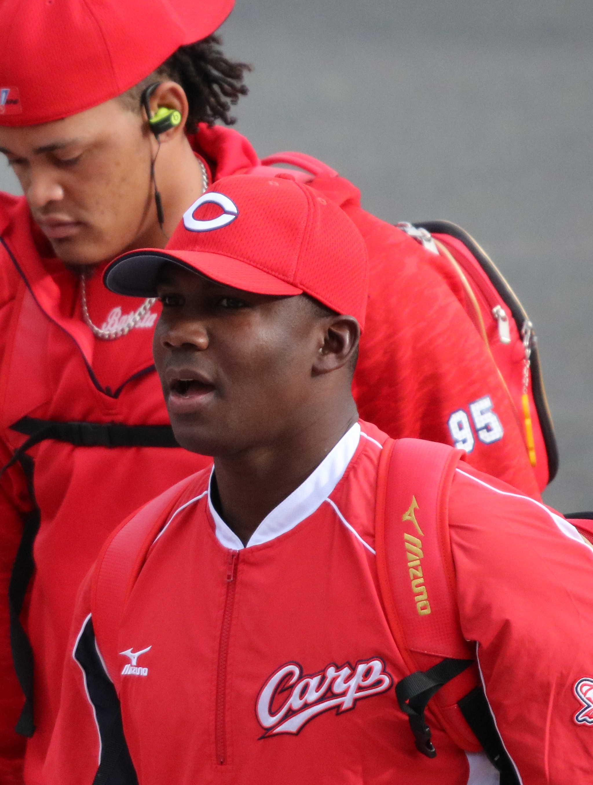 2017/11/7 天福球場(左奥はバティスタ)